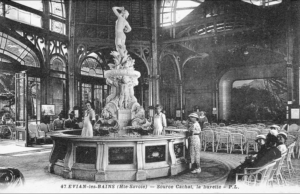 Evian-source cachat-la buvette